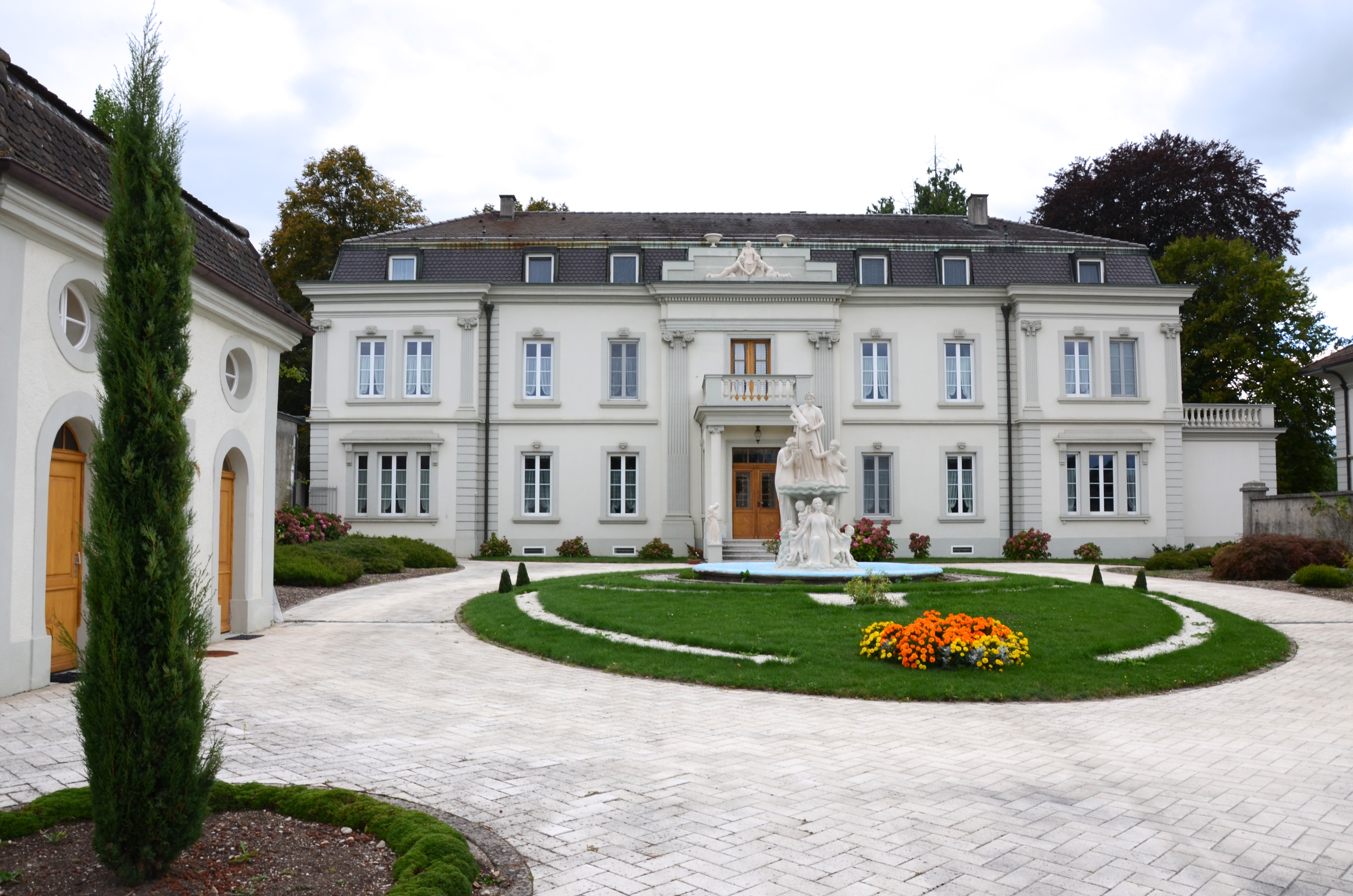 Château Duval, Route de Vallière 27, Cartigny